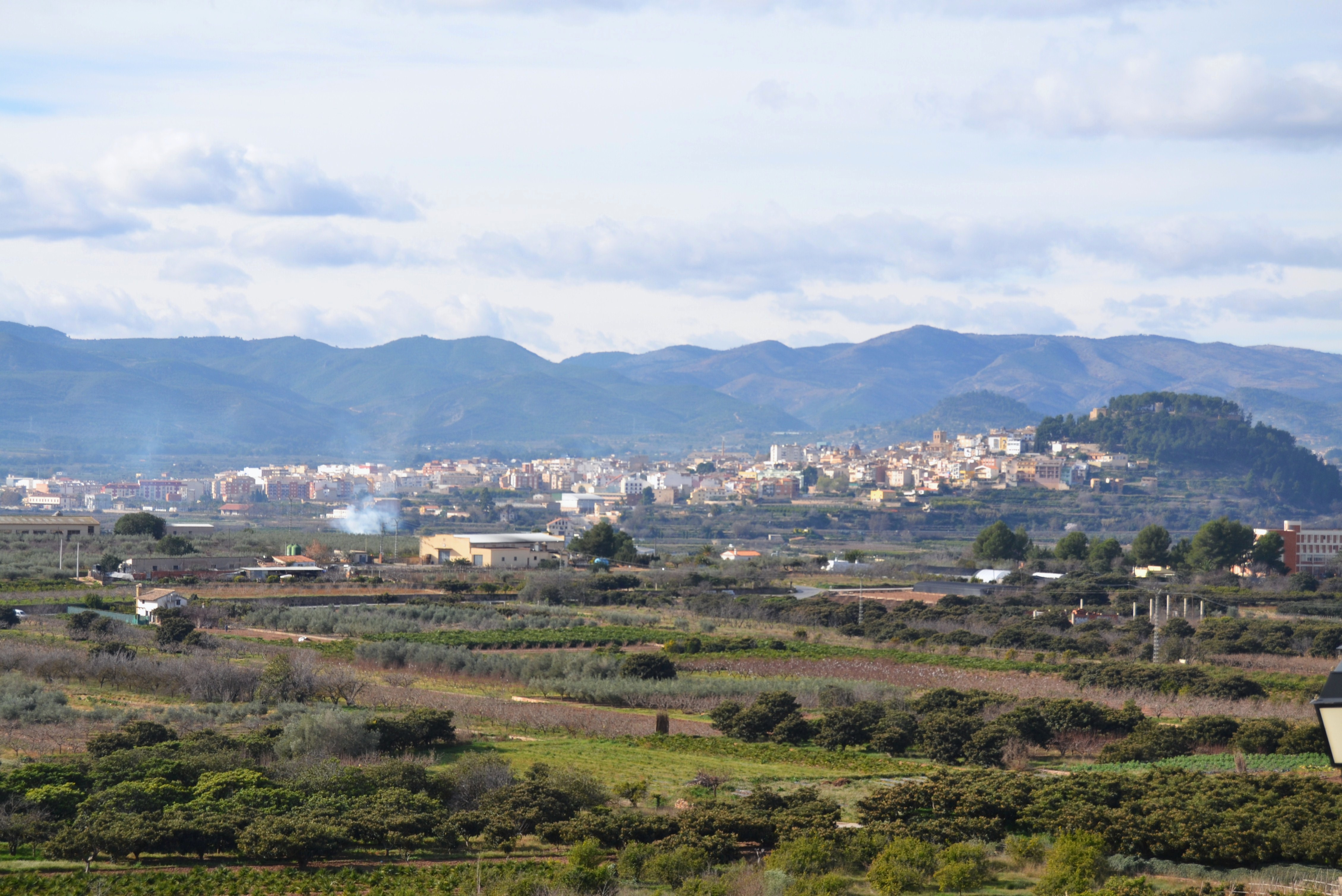 Sogorb des de Castellnou.